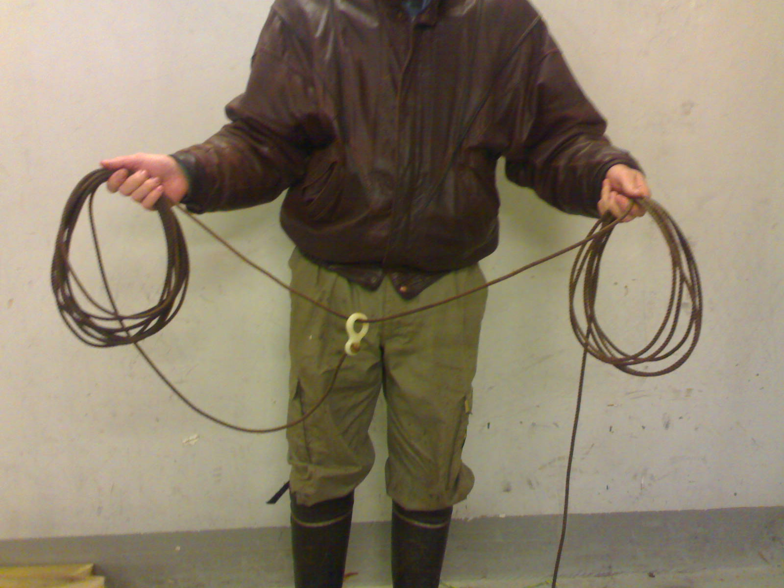 Suopunki vyyhdettynä heittoa varten.